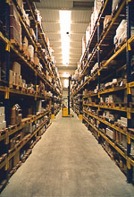 LogiC (SPC)×